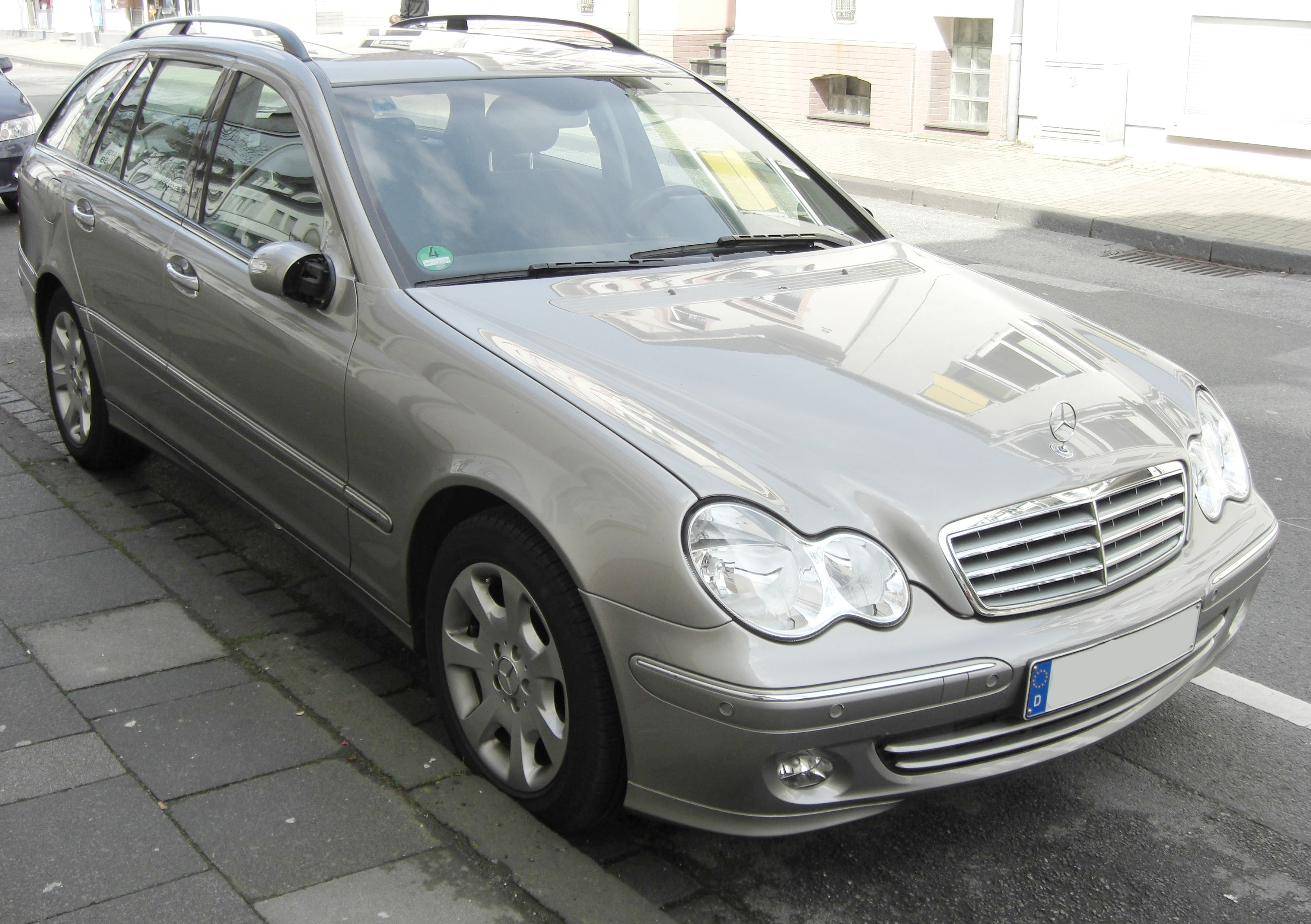 Mercedes C-Klasse T-Modell